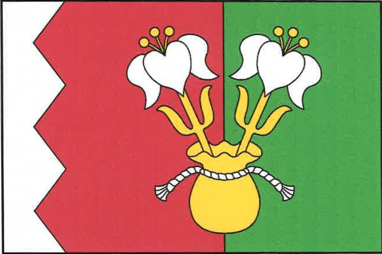 Luka (CL), vlajka. List tvoří tři svislé pruhy, bílý, pilovitý červený se třemi zuby sahajícími do první dvanáctiny délky listu a zelený, v poměru 2 : 5 : 5. Na styku červeného a zeleného pruhu vyrůstají ze žlutého váčku, převázaného bílou šňůrou, dvě odkloněné bílé přirozené lilie se žlutými tyčinkami na žlutých stoncích. Poměr šířky k délce listu je 2 : 3.